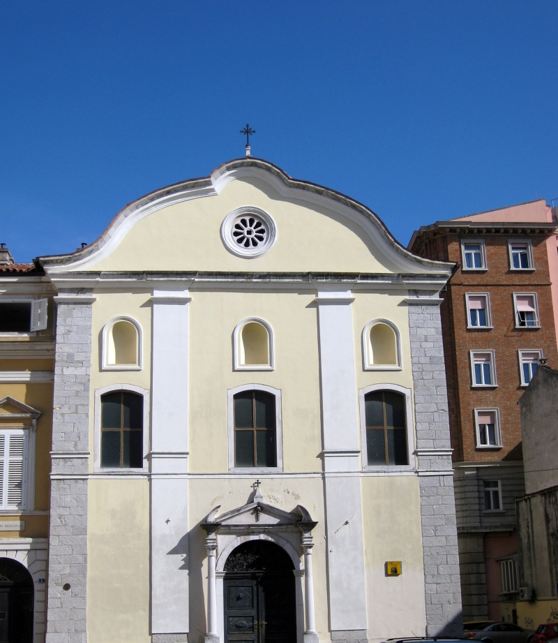 Crkva Sv. Jeronima (1768. g.) u Rijeci. Croatia